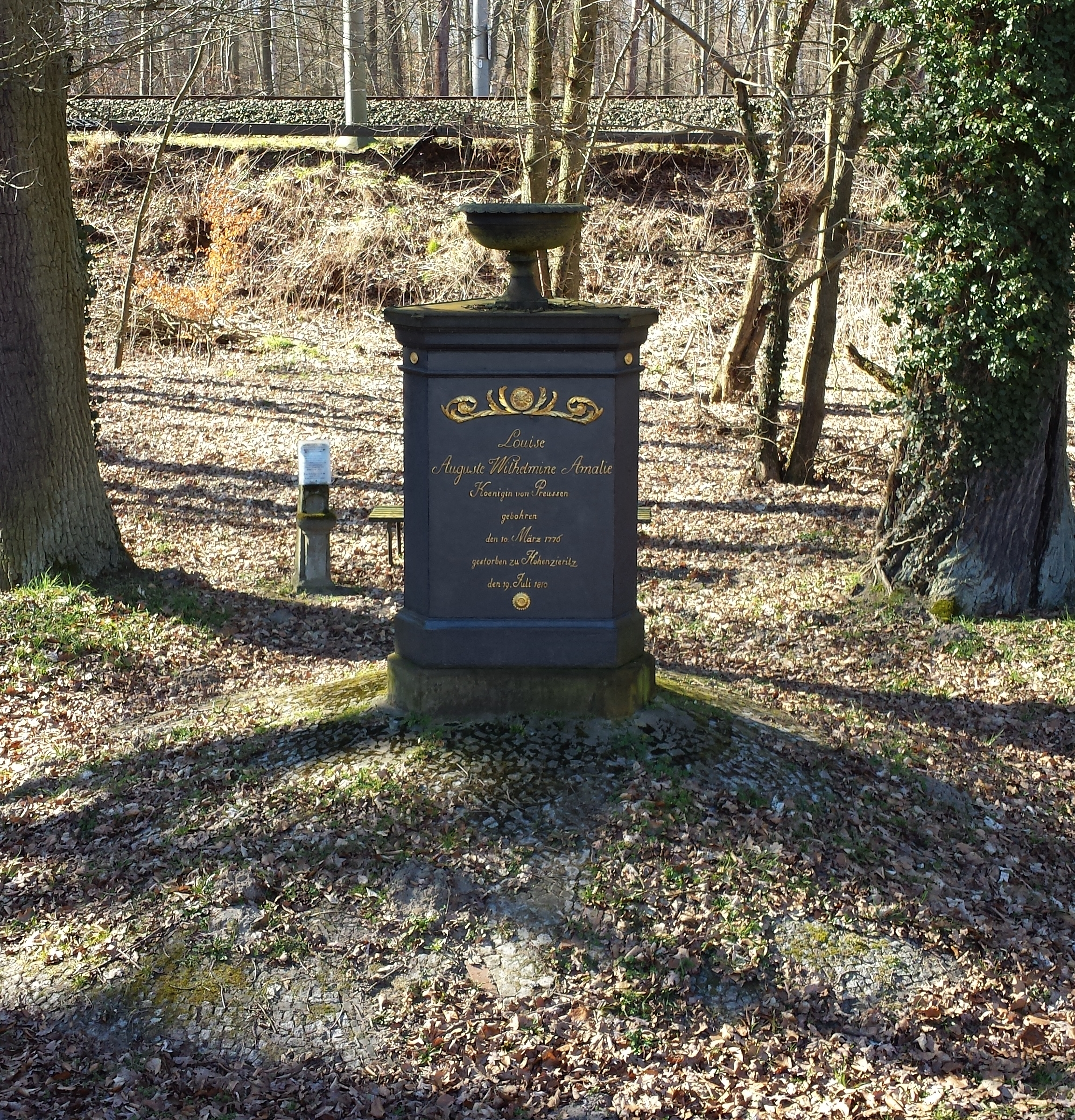 Luisendenkmal B96 Abzweig Seilershof